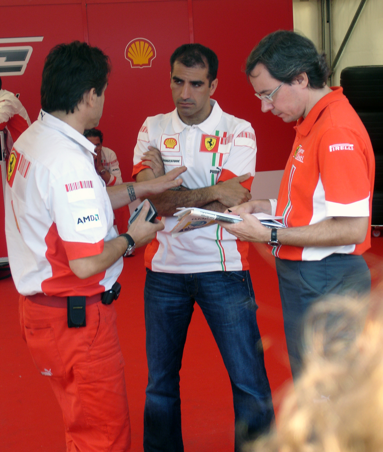 Marc Gené, pilot de Fórmula 1 (durant l'acte de commemoració del "Circuit de Montjuïc").